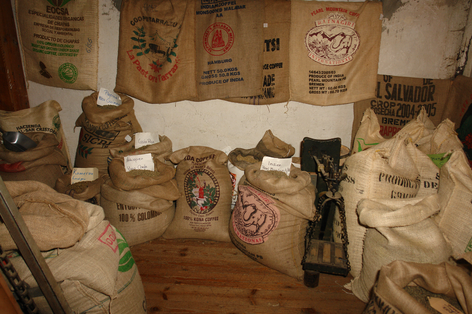 Kaffeerösterei Münchhausen in Bremen: Kaffeelager